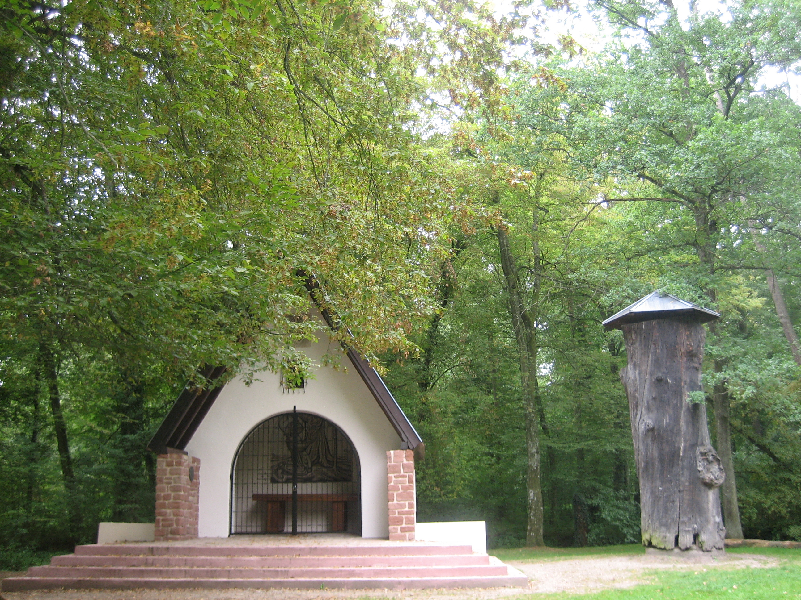 Gros chêne et la chapelle à Haguenau, France